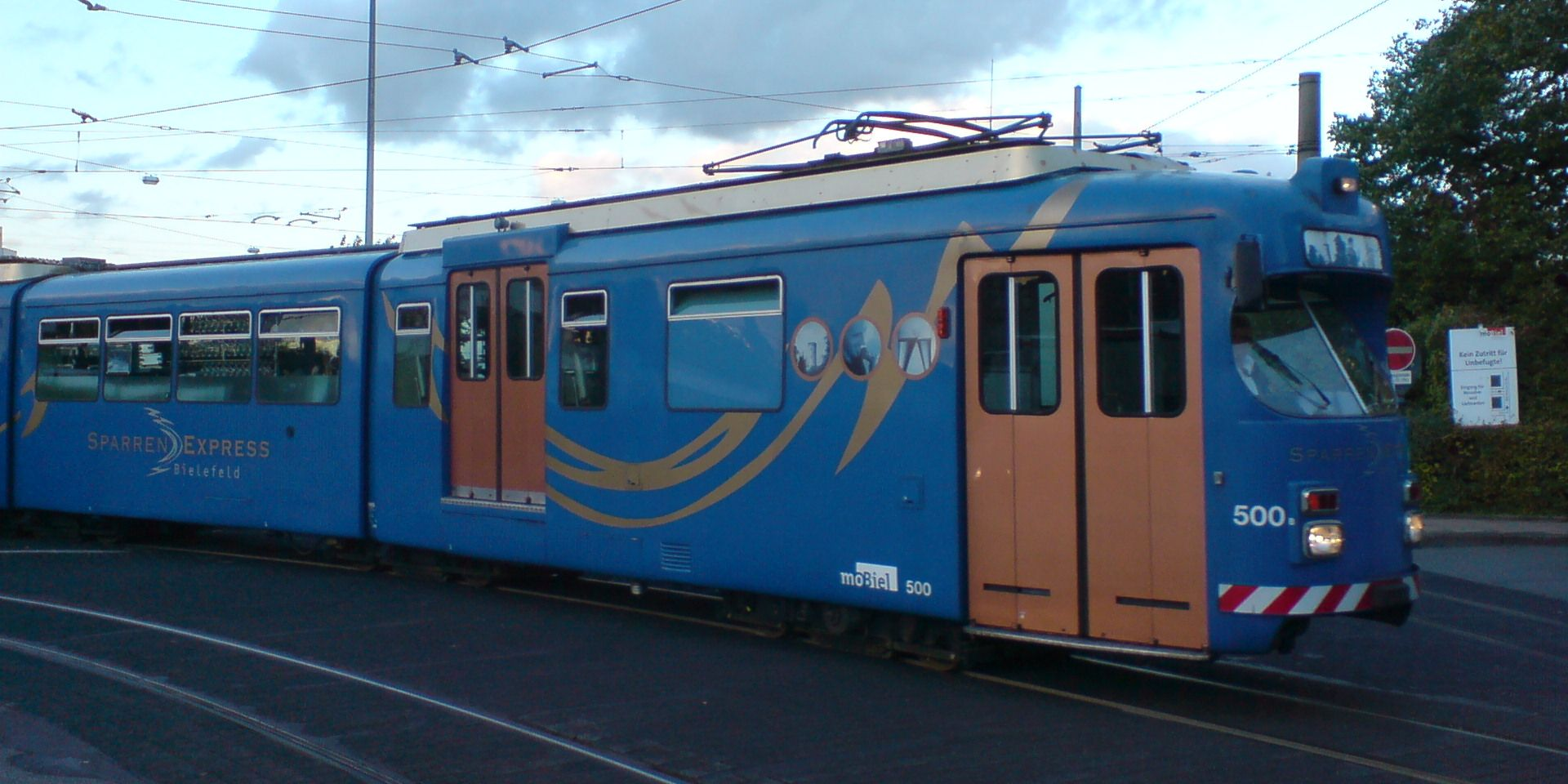 Bielefeld, Deutschland: Sonderfahrzeug „Sparrenexpress“ der Stadtbahn Bielefeld bei der Ausfahrt aus dem Betriebshof in Sieker.